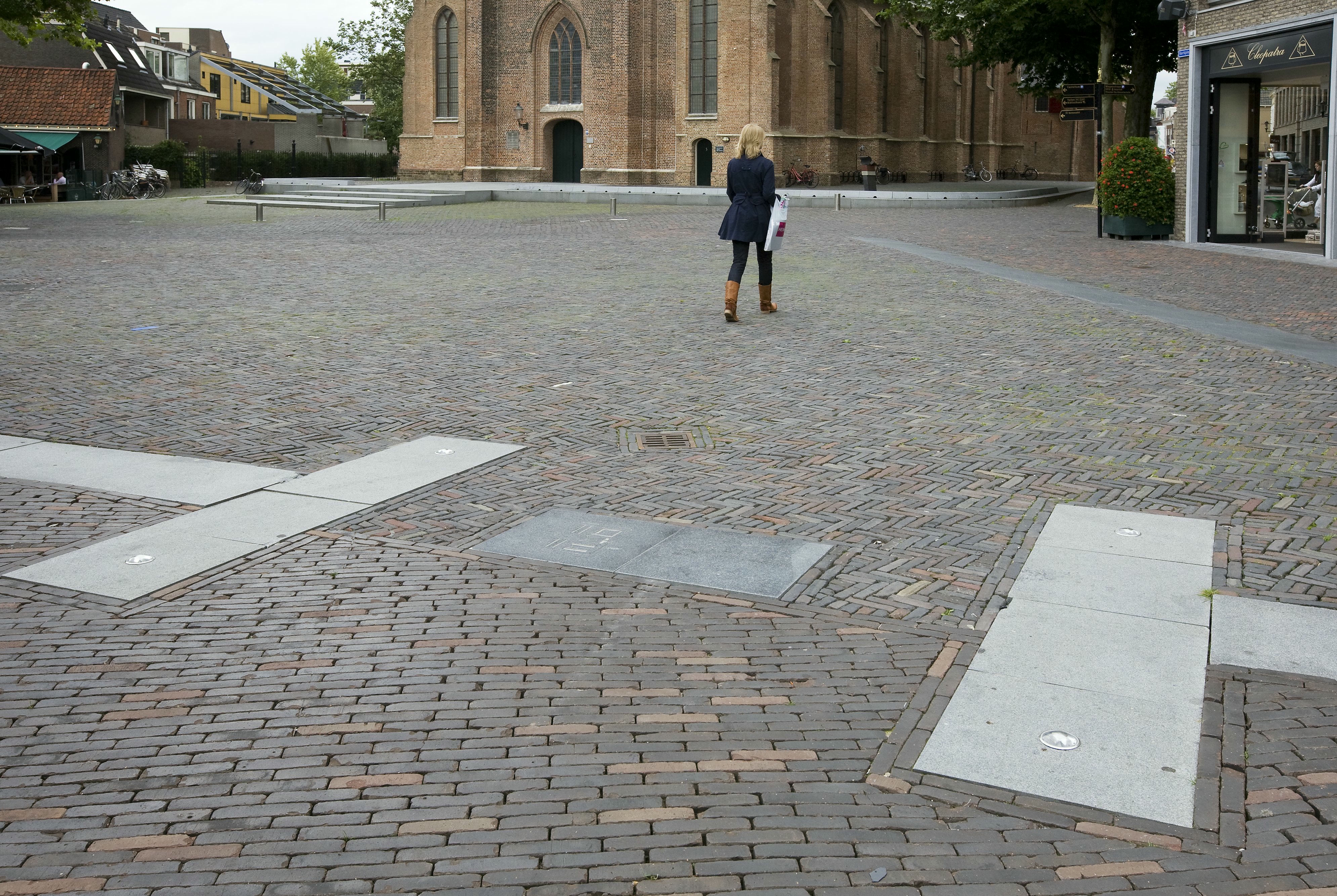 Castellum/ Plaveisel: Overzicht, contouren van het castellum in het plaveisel, Kerkplein (opmerking: Publicatie: Monumenten van Romeins Nederland Beschermingsagenda Archeologie 2008)